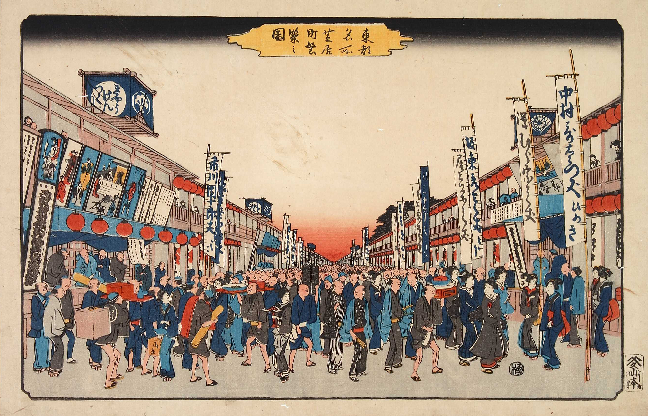 芝居見物客で賑わう猿若町。通り左側手前から中村座・市村座・河原崎座。それぞれの芝居小屋の入口上方には櫓があがっている。天保末年 (1843–44)。